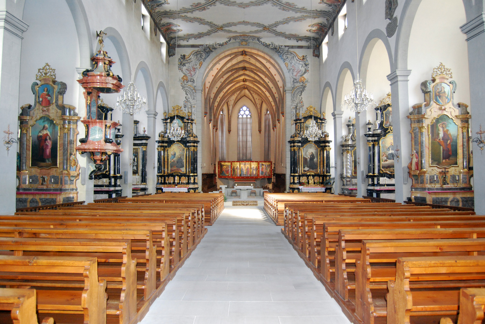 Fribourg, église des Cordeliers, nef et choeur